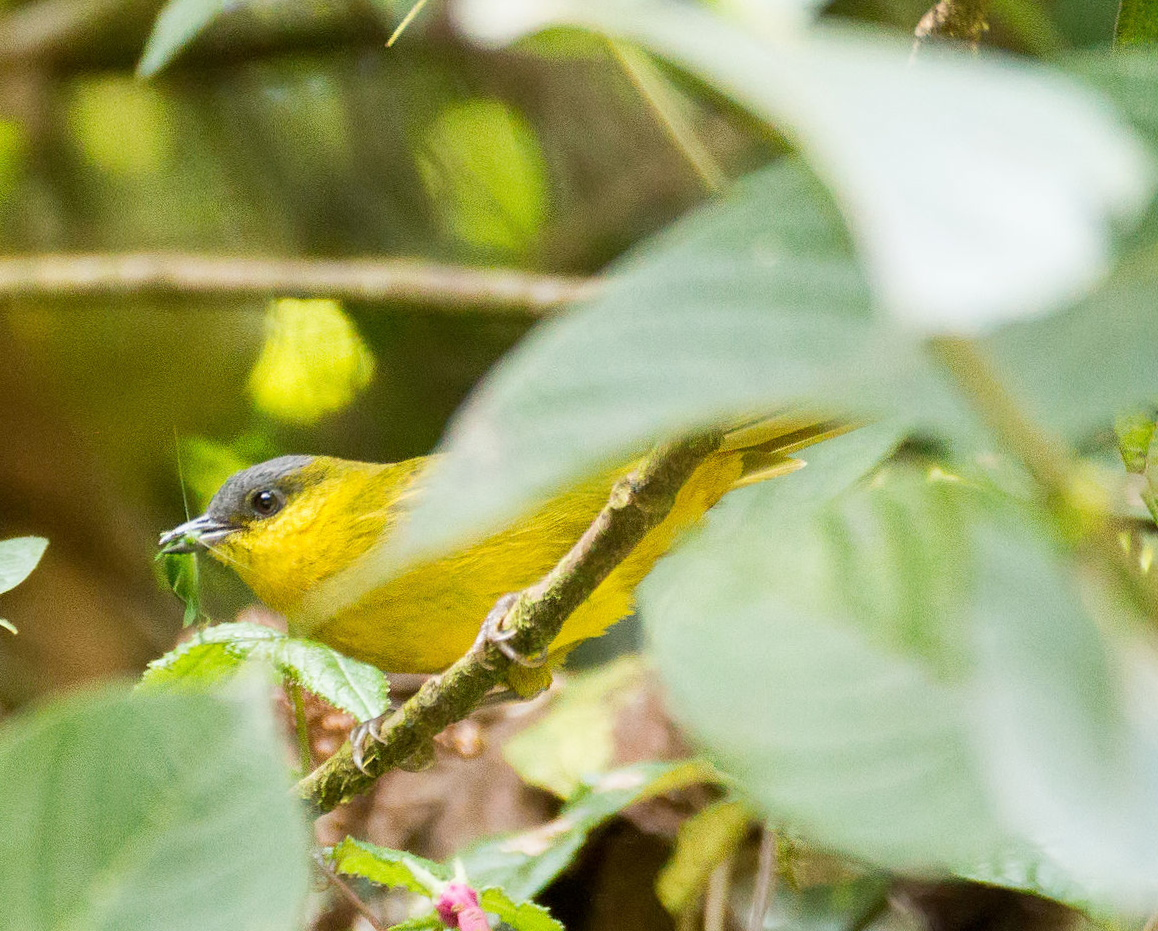 Endemic bird of Venezuela Ave endémica de Venezuela